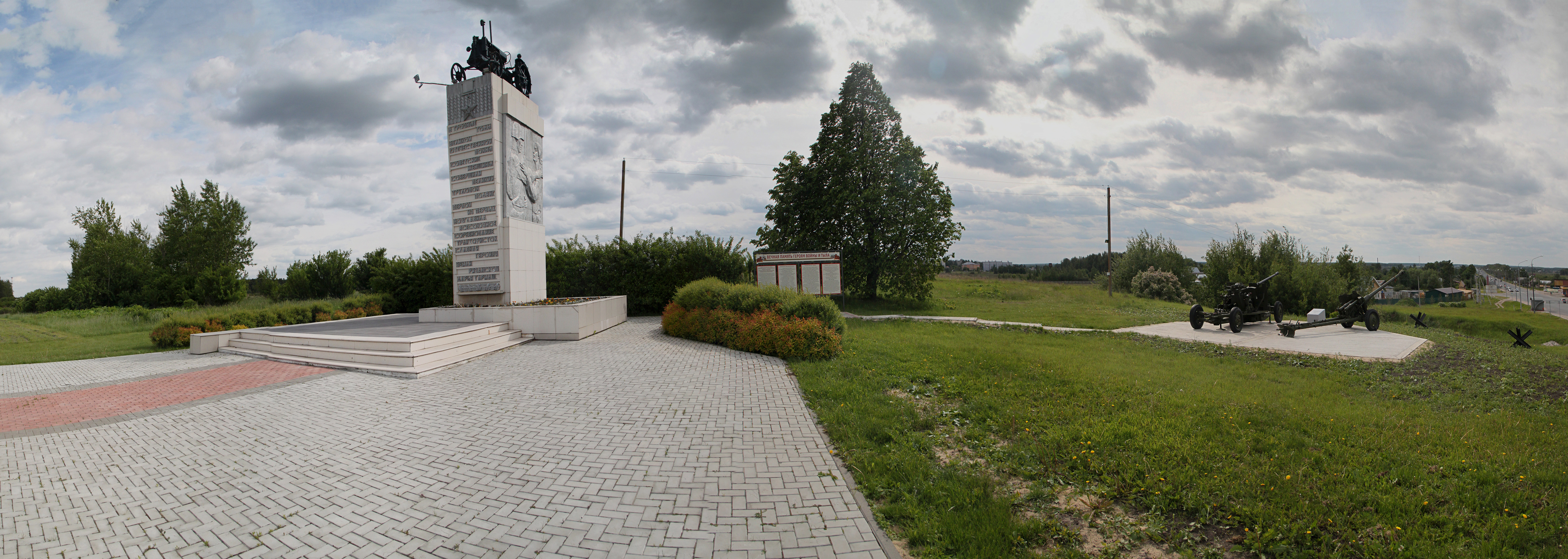 Памятник трудовому подвигу женщин , Зеленинские Дворики, Рьбновский район